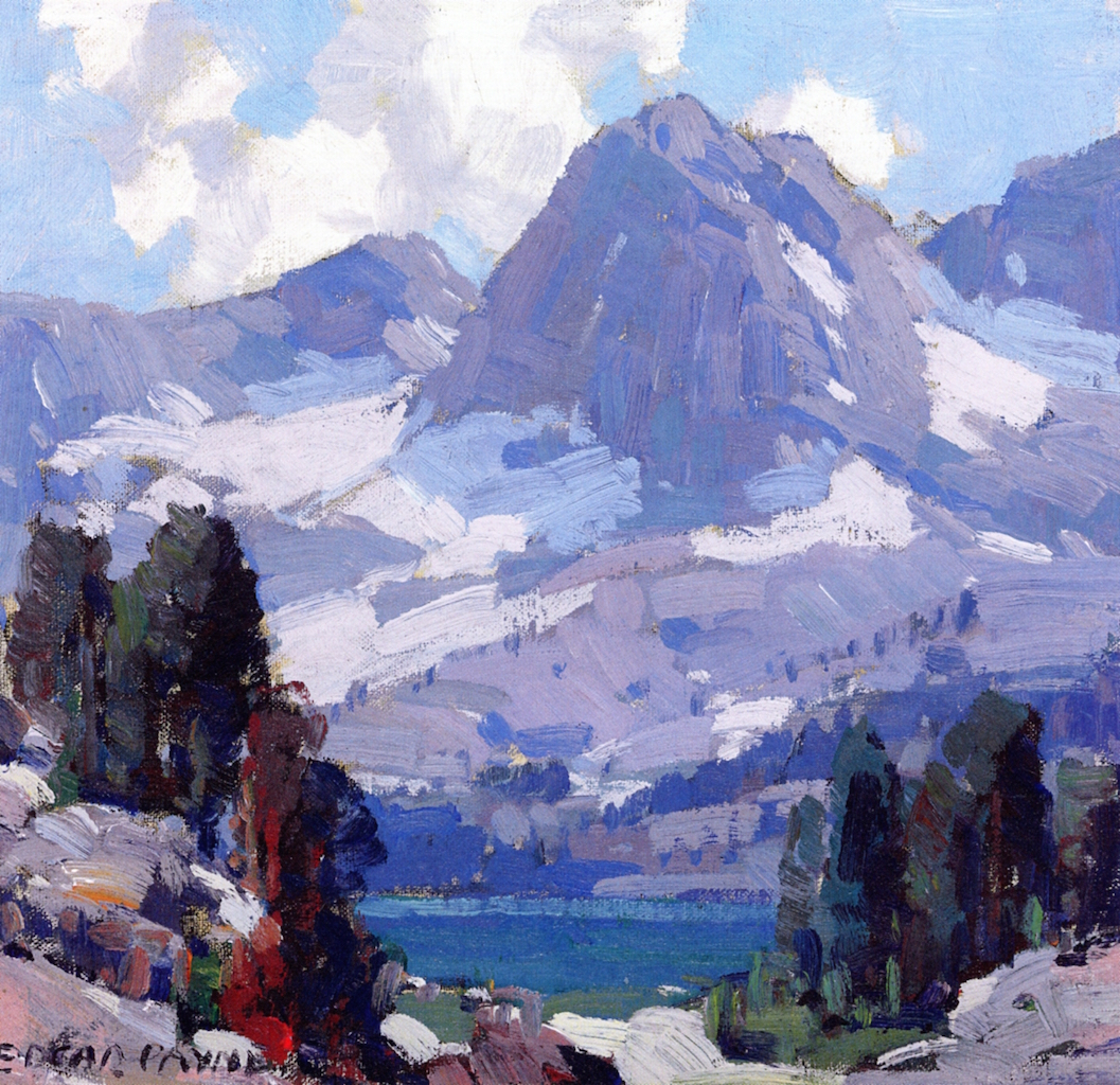 Картины Эдгара Пейна (англ. Edgar Alwin Payne; 1883—1947) — американского художника-импрессиониста